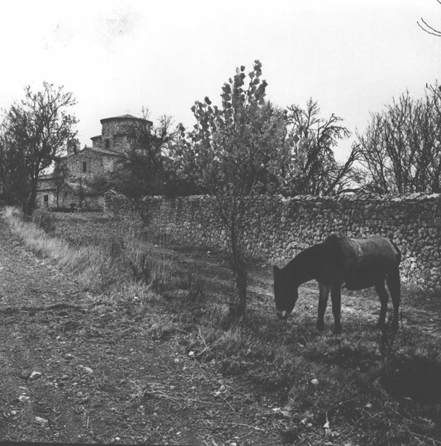 Ermita de Nuestra Señora de la Anunciada - Urueña (Valladolid) - Fotografía 200 x 230 B/N